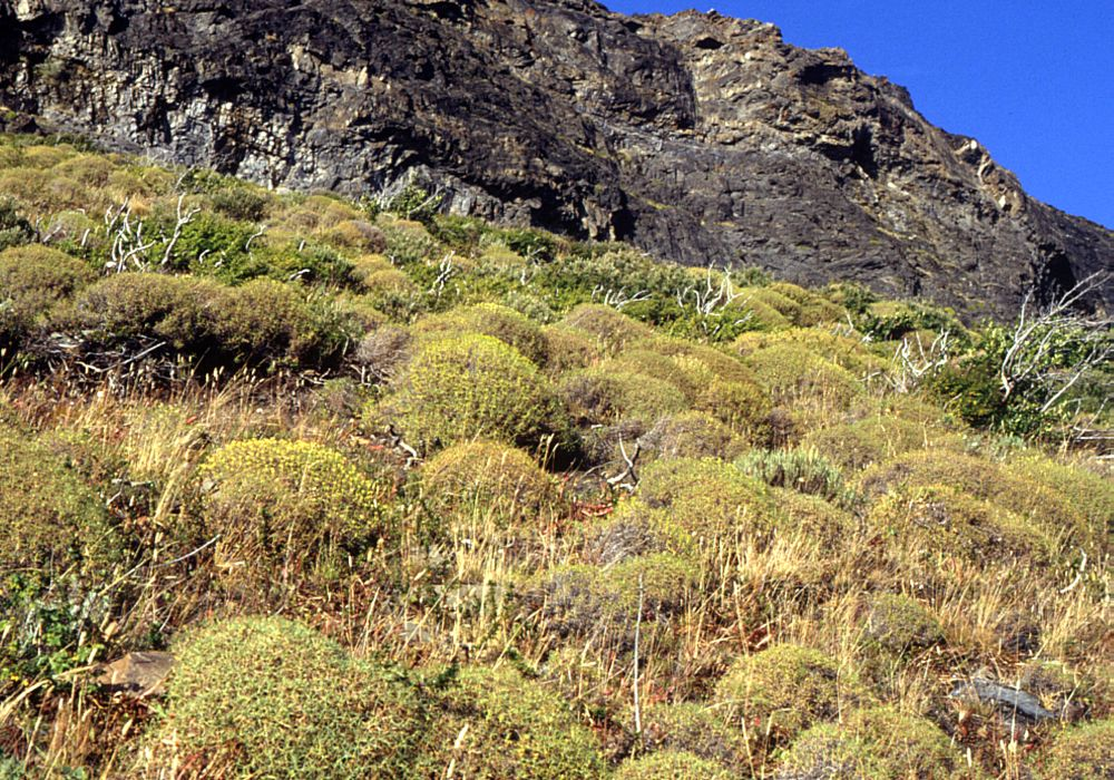 Mulinum spinosum (Apiaceae) - Chile, Patagonien/Patagonia, Parque Nacional Torres del Paine, N Posada Río Serrano